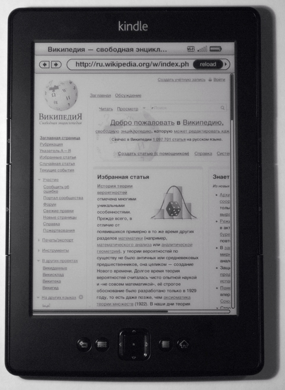 Фотография устройства для чтения электронных книг Amazon Kinde 5 с Заглавной страницей русской Википедии.